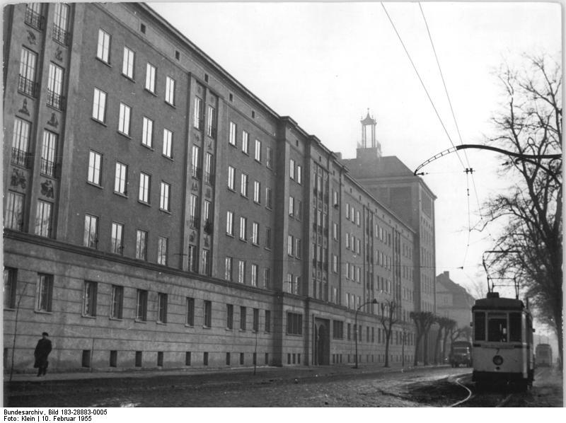 Stralsund, Stalinstraße, "Haus Baltik" Zentralbild Klein .10 Motive 10.2.1955 Städteaufbau in der Deutschen Demokratischen Repuplik 3. Folge: Aufbau in Stralsund Auch in der Werftstadt Stralsund sind in den letzten Jahren neue Wohnbauten emporgewachsen. Ein völlig neuer Stadtteil in der Tribsser Vorstadt entstanden. Die Städtebauer von Stralsund entwerfen bereits die Pläne für die Bauten des II. Fünfjahrplann. UBz: Neue Wohnbauten in der Stalinstrasse, im Hintergrund das Hochhaus -Haus Baltik-. Aufgenommen Anfang Februar 1955